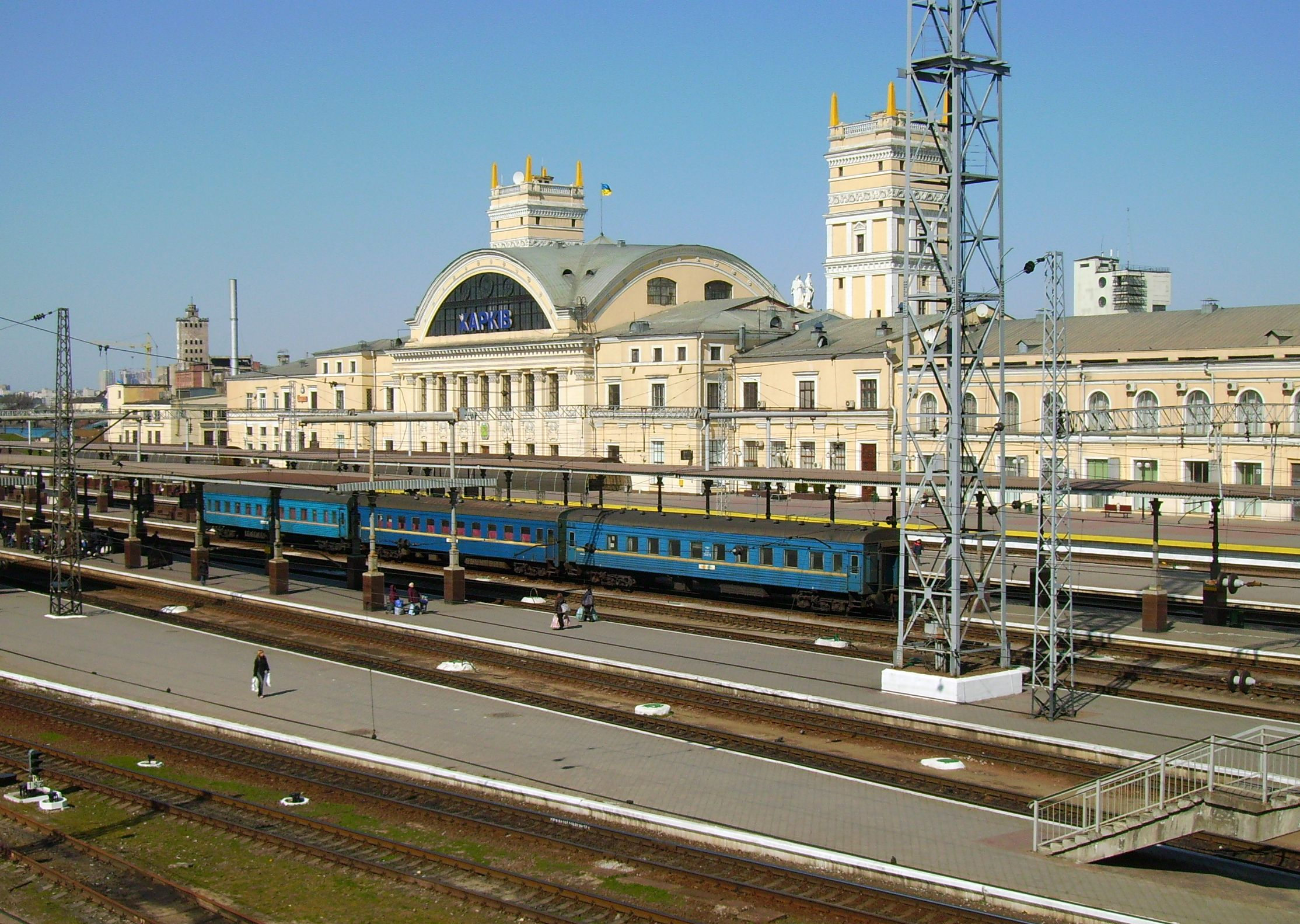 Вид на железнодорожный вокзал с переходного моста